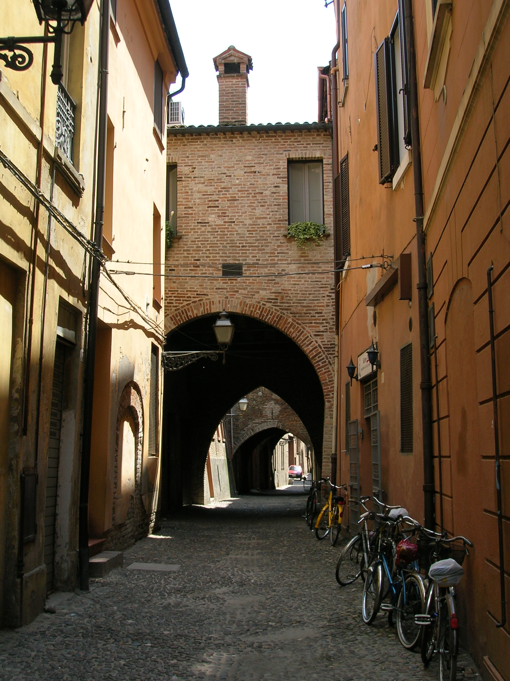 Vicolo ferrarese